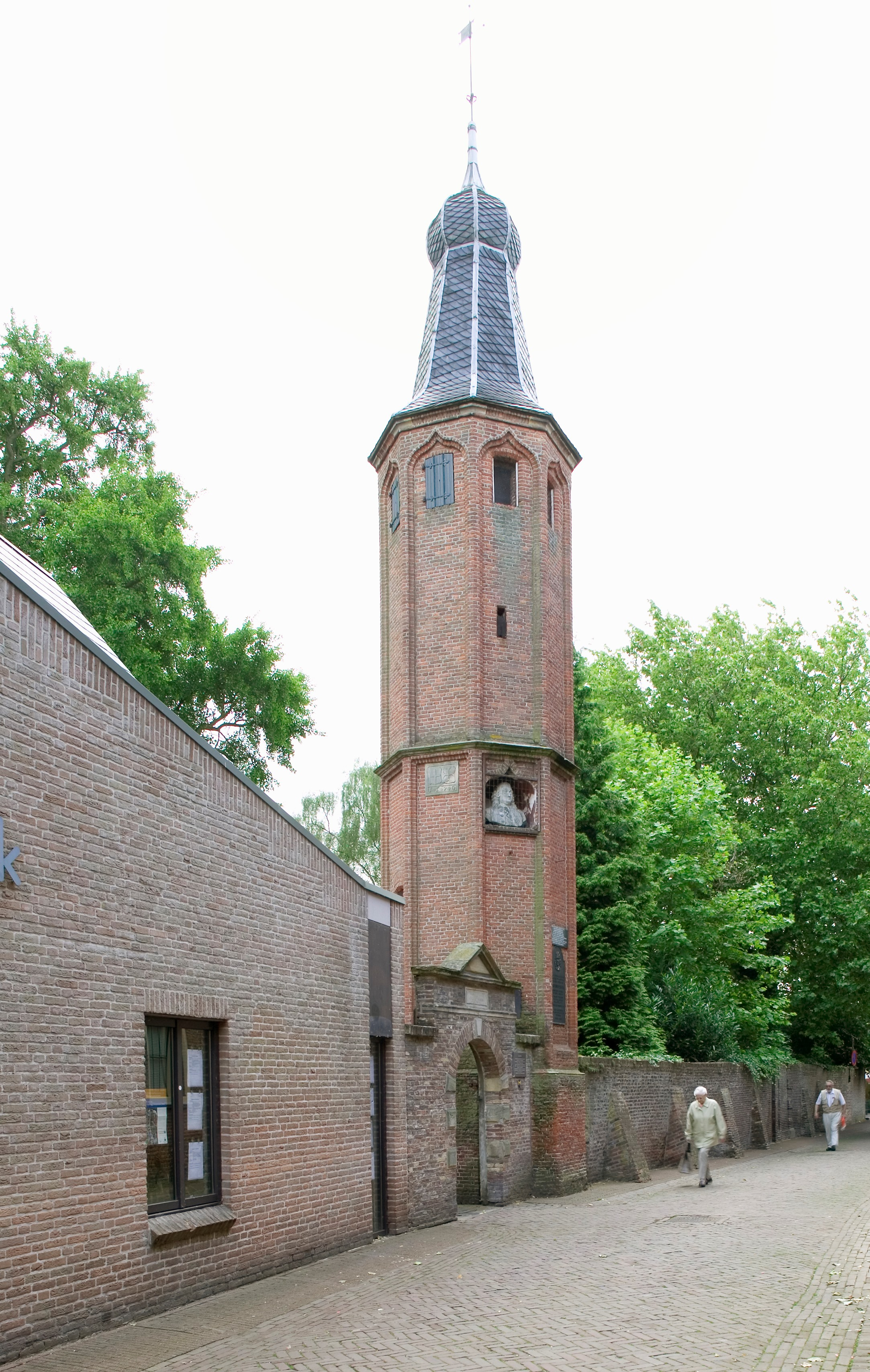 Voormalig refugium 's-Heerenloo: Overzicht van het torentje en het poortje met fronton, met straatbeeld